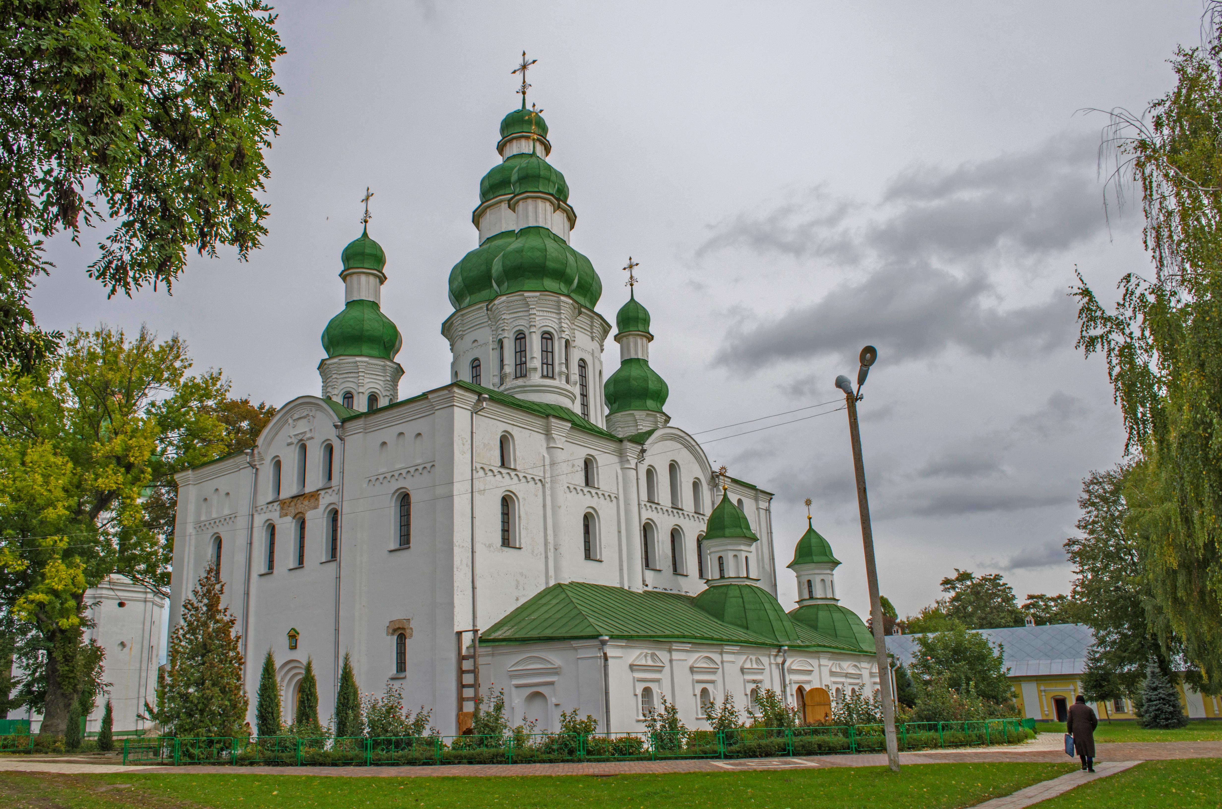 Успенський собор (мур.), Чернігів, вул.князя Чорного, 1